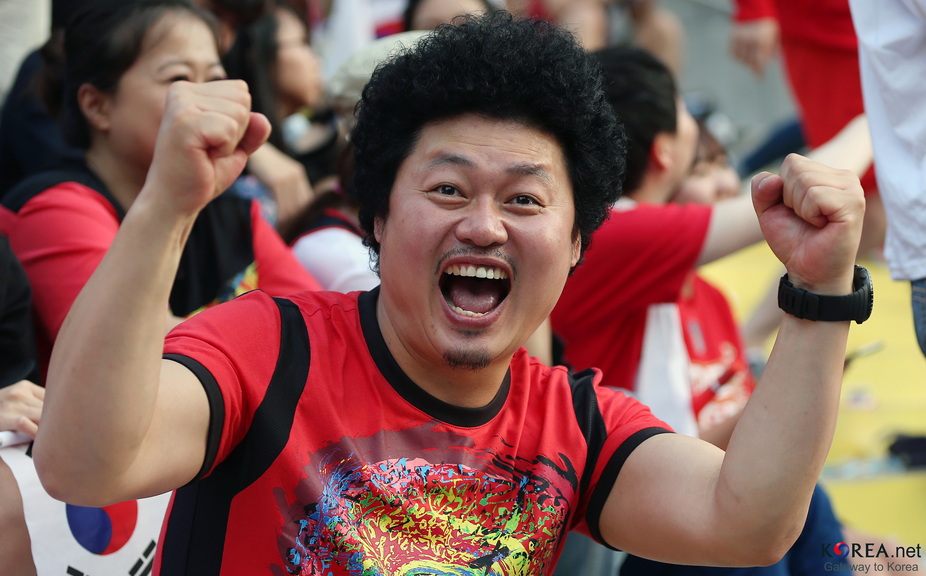 During the game between Korea and Belgium in the 2014 FIFA World Cup in Brazil, Yoon Taek, a comedian, shouts, "Korea," in Gwanghwamun Square in central Seoul on June 27. June 27, 2014 Gwanghwamun Square, Seoul Related Articles -Cheon Wa Dae- Cheers for team Korea fill the country, despite loss - -English Cheers for team Korea fill the country, despite loss Red Devils: 'We'll return in four years' Ministry of Culture, Sports and Tourism Korean Culture and Information Service ( Official Photographer: Jeon Han This official Republic of Korea photograph is CC-BY-SA-2.0-licensed, so while restrictions such as personality or privacy rights may apply, in general, manipulations are allowed. If you require a photograph without a watermark, please use Flickr e-mail. 2014 브라질 월드컵 조별예선 한국 대 벨기에 거리 응원 2014-06-27 광화문광장 문화체육관광부 해외문화홍보원 코리아넷 전한